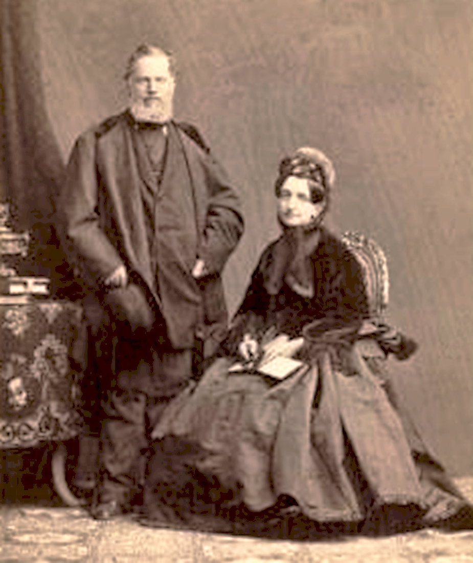 Baron Simeon von Sina mit Gattin Iphigénie Ghika vor 1876